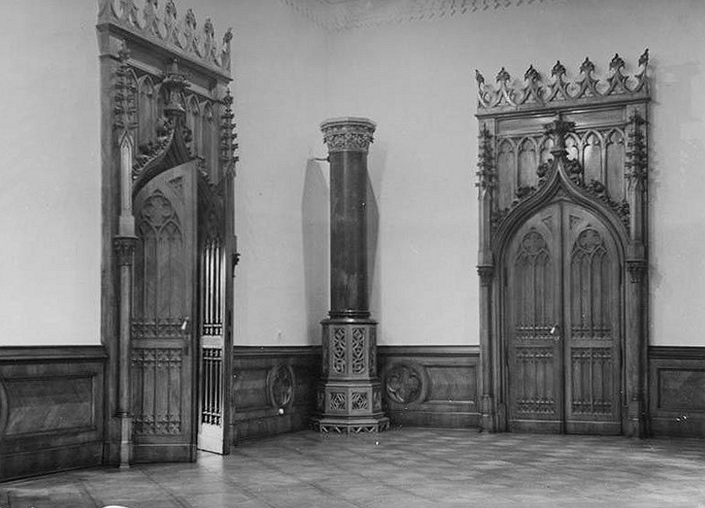 wnętrze pałacu w Miechowicach, skrzydła drzwiowe